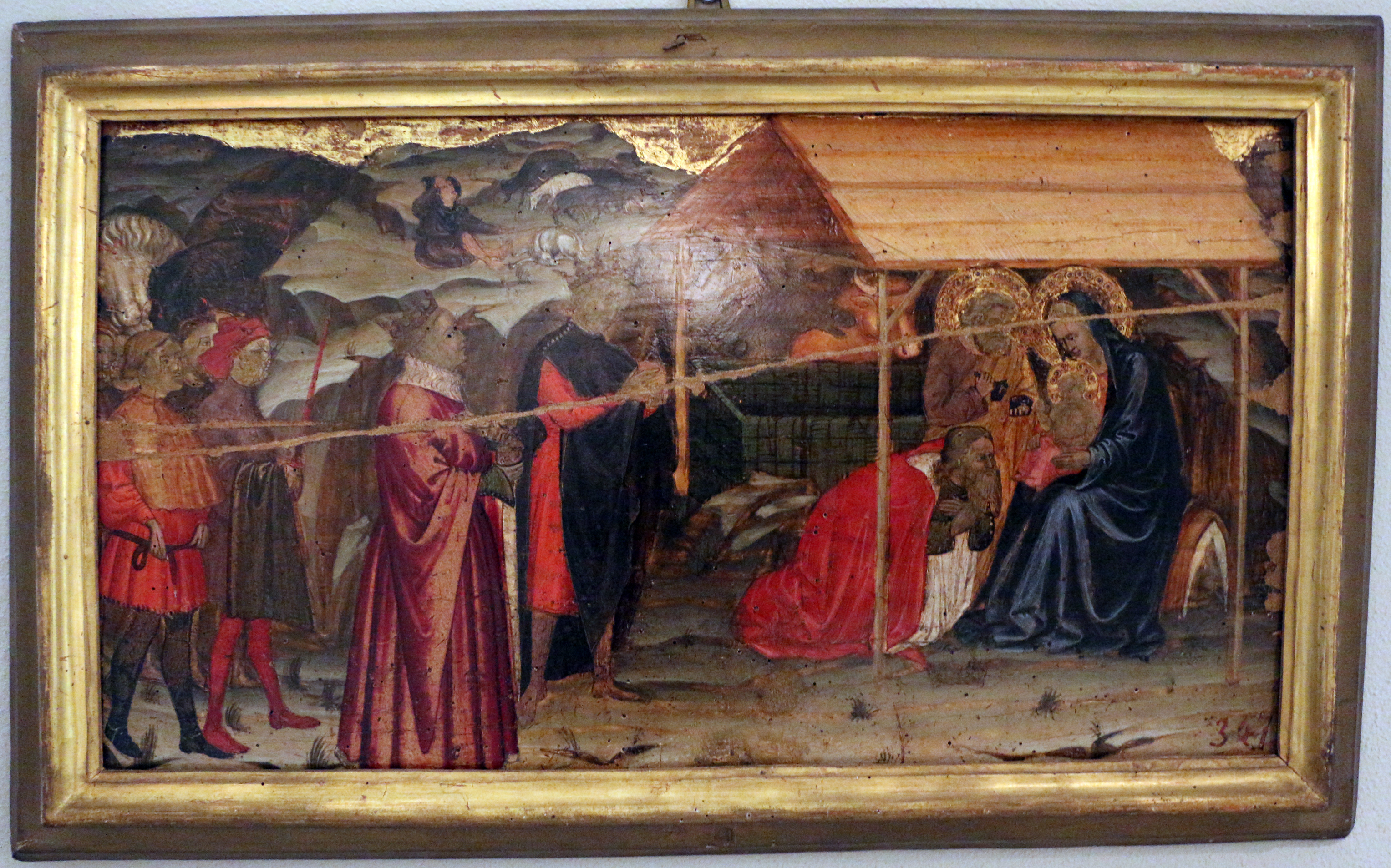 Pinacoteca Nazionale di Bologna This is a photo of a monument which is part of cultural heritage of Italy.